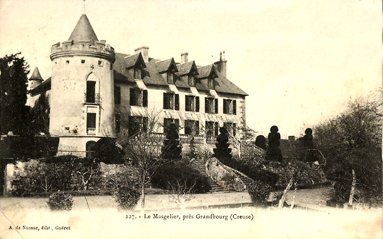 Durant la Seconde Guerre mondiale, de nombreux "enfants cachés" y furent dissimulés.